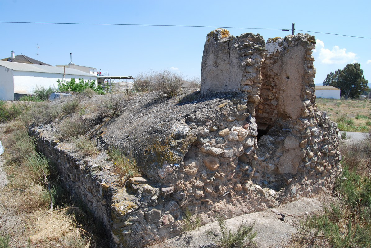 Vista frontal del Aljibe de la Estación de Puerto Lumbreras